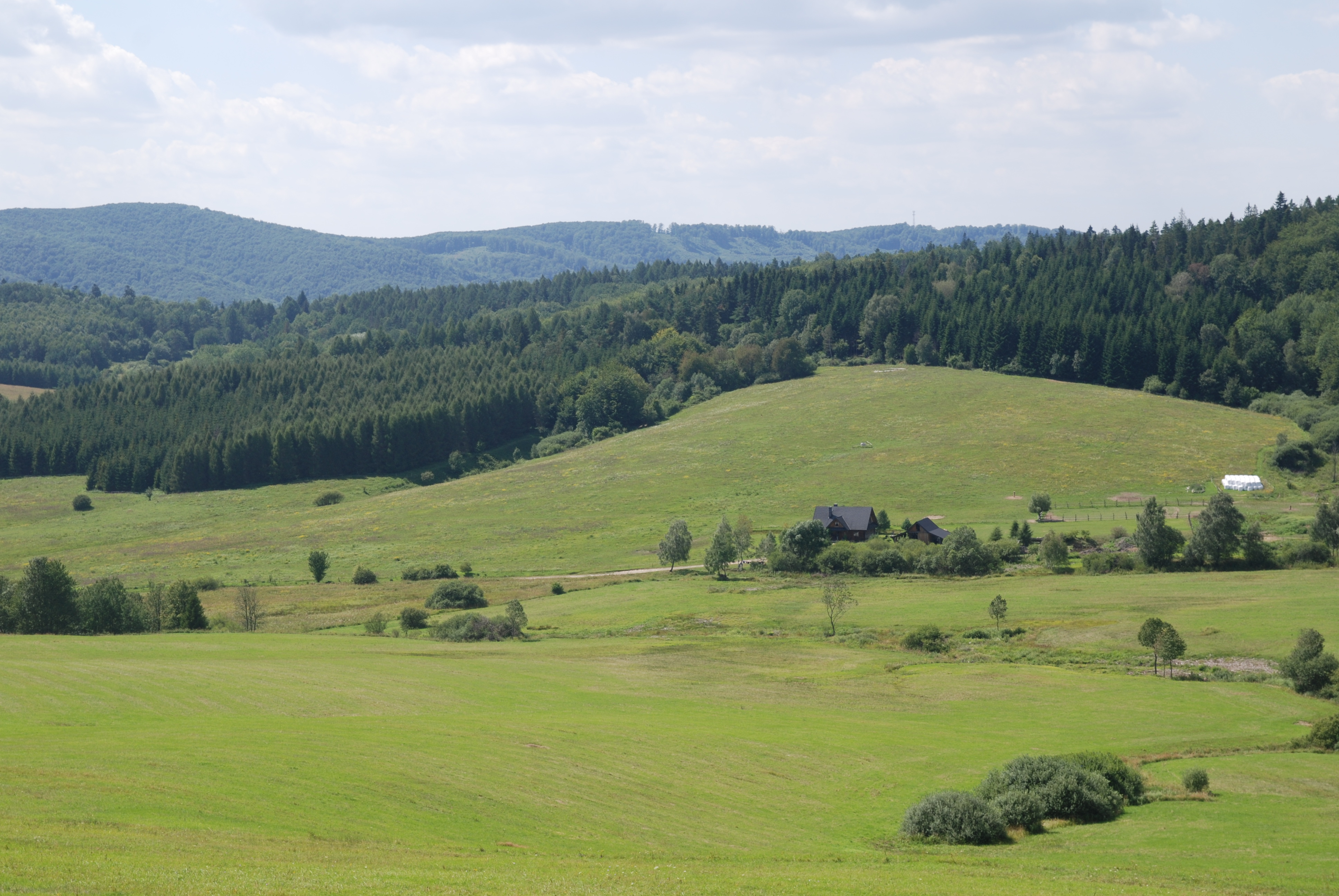 wieś Stary Łupków